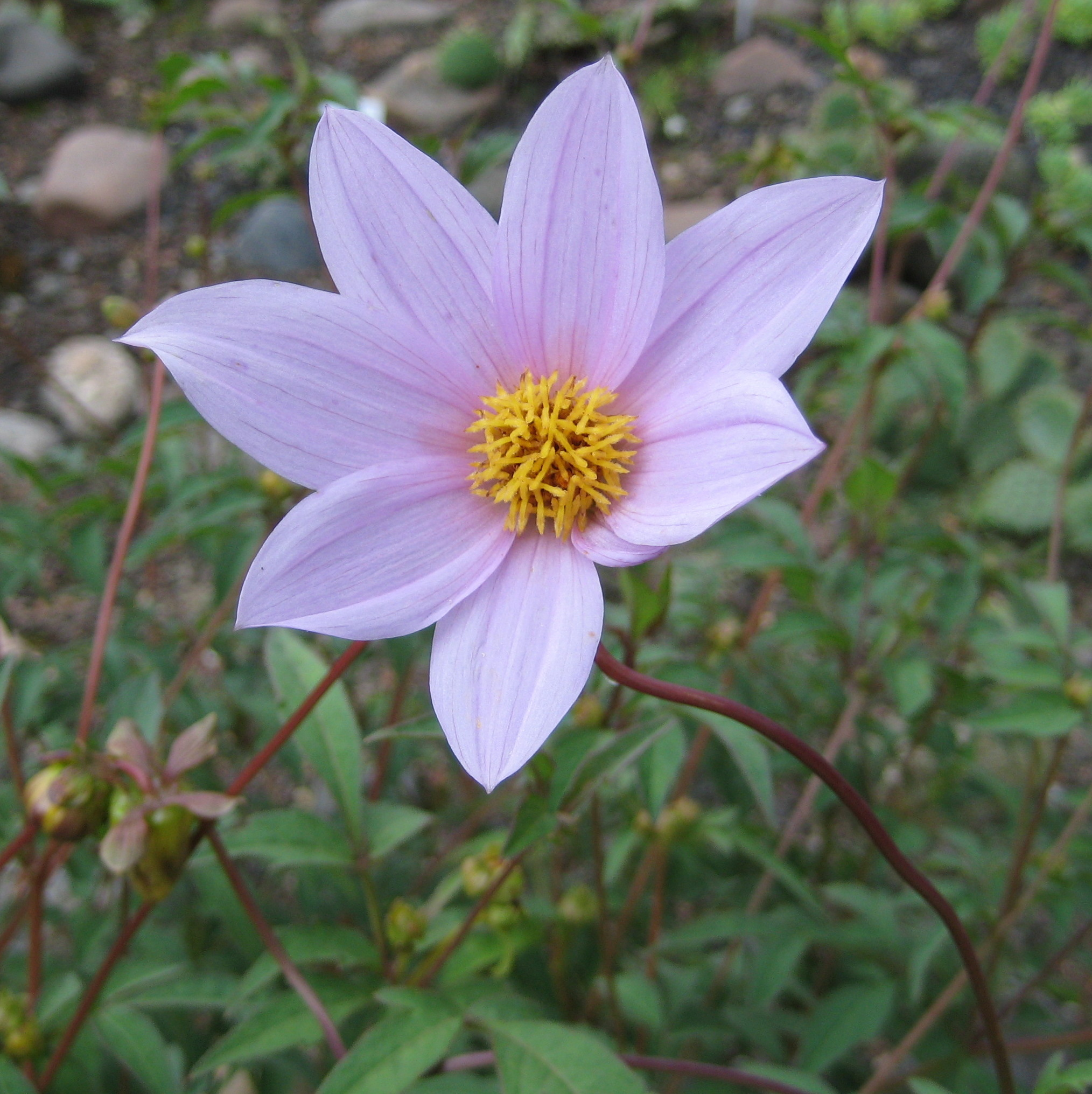 Dahlia sherffii im Botanischen Garten Dresden